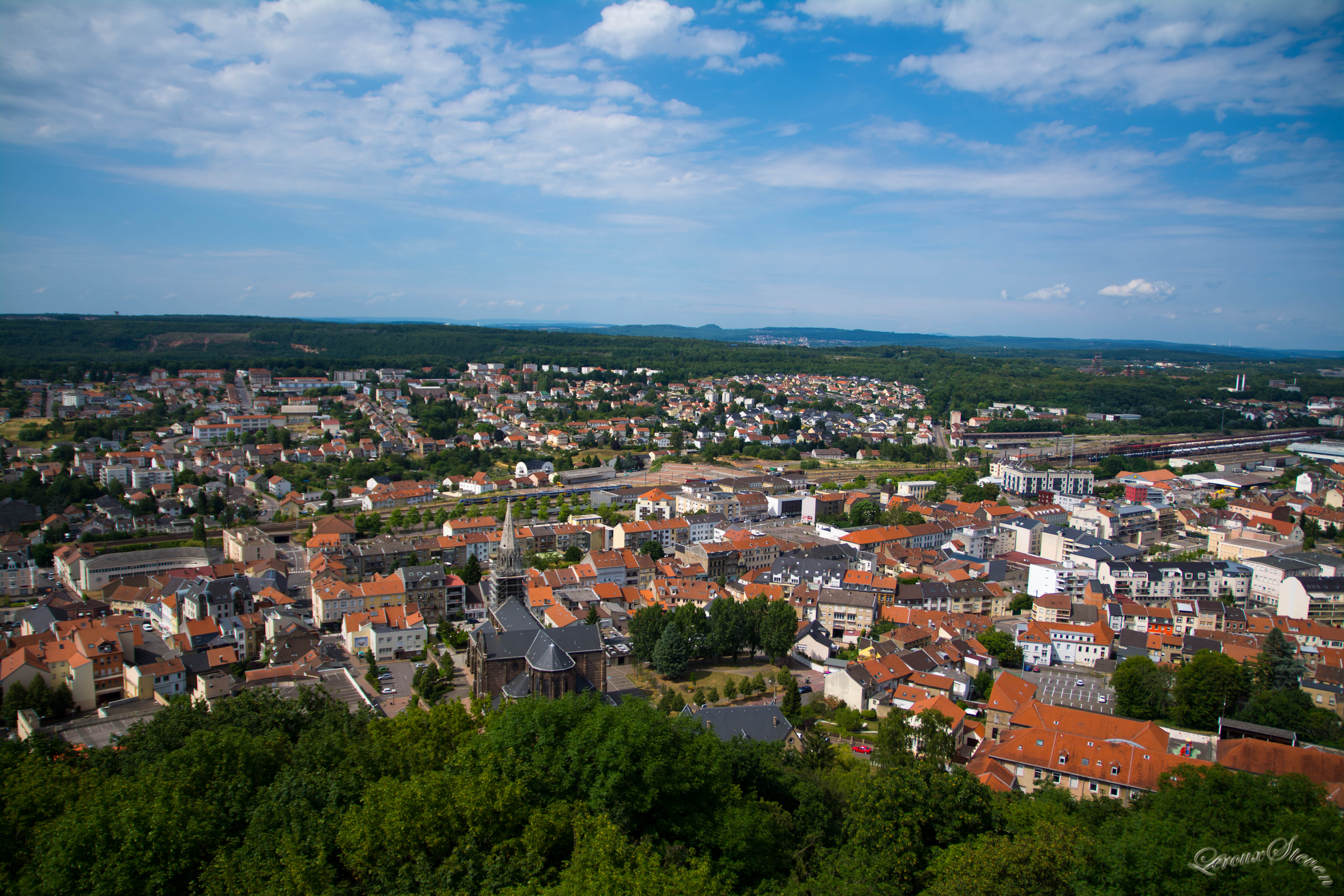 Chateau du schlossberg